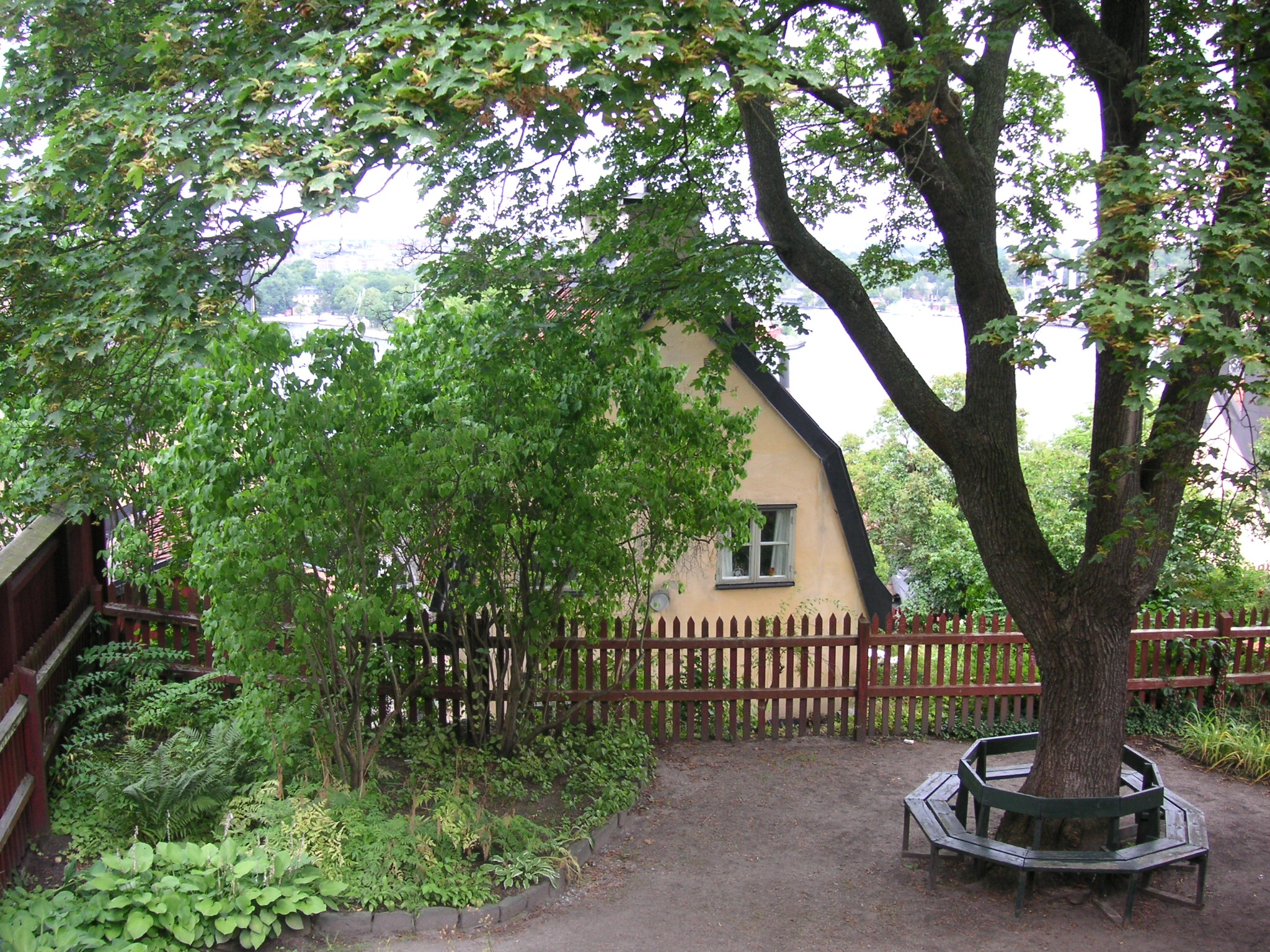 "Anna Lindhagens Täppa" på Södermalm, Stockholm. Nedanför syns bostadshuset Fjällgatan 32B.